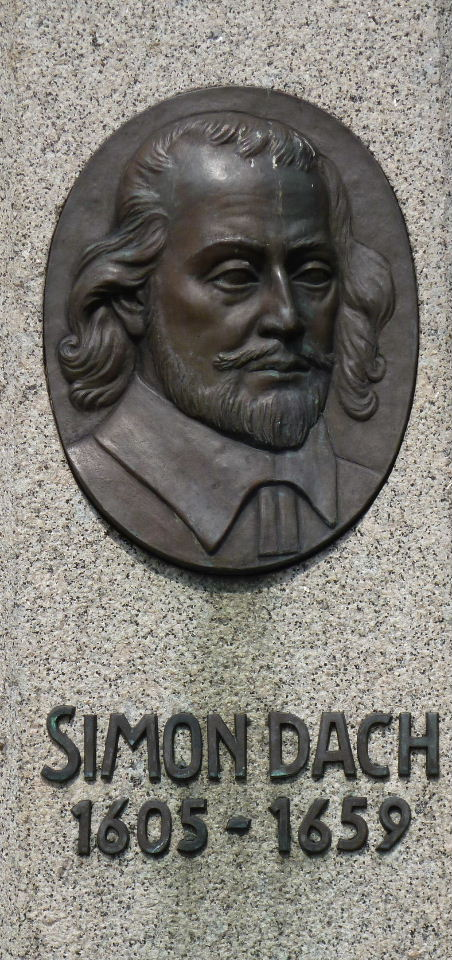 Harald Haacke: Replik der Plakette von Simon Dach auf dem Sockel des "Ännchen von Tharau"-Denkmals auf dem Theaterplatz in Klaipėda